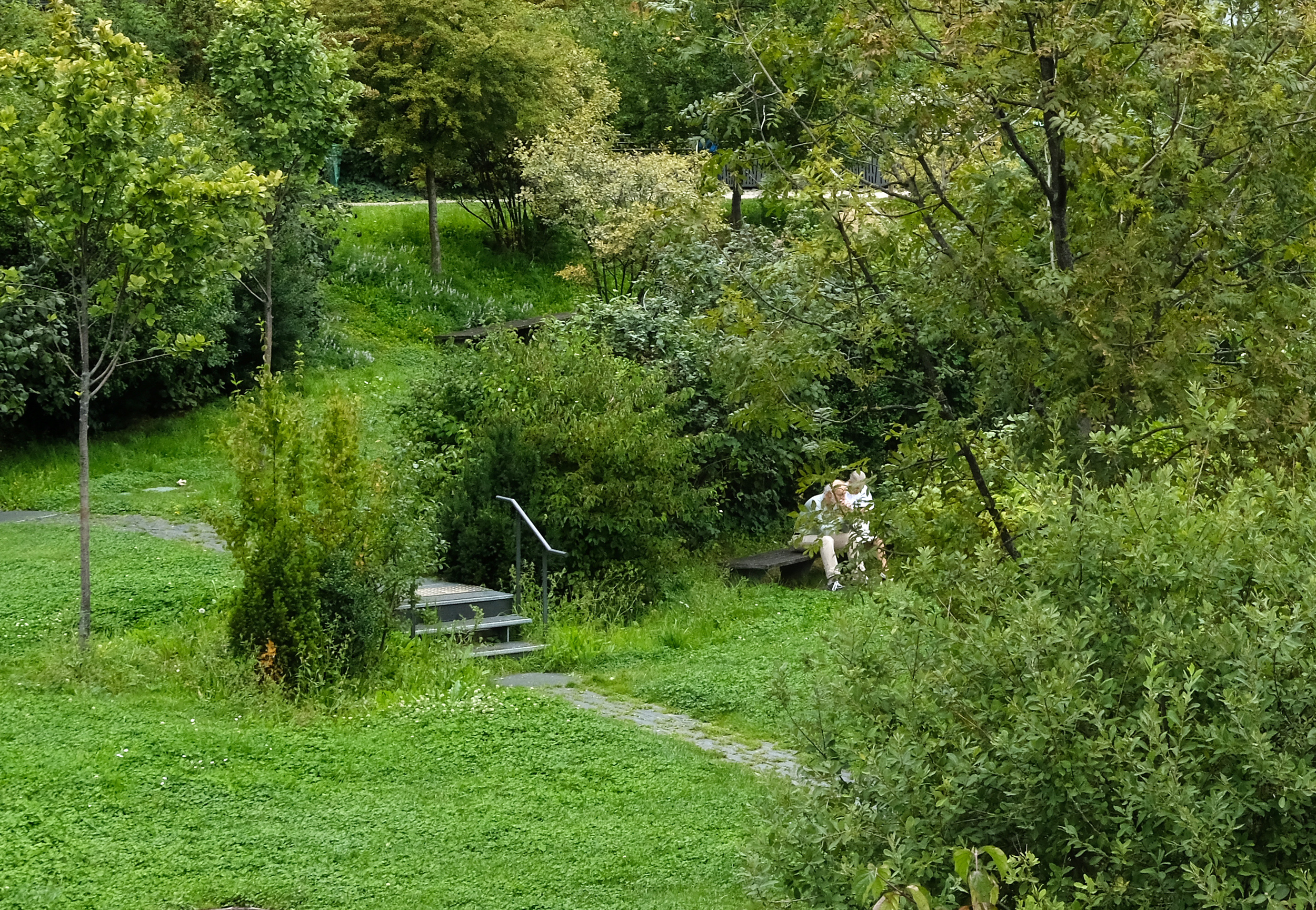 Jardins Abbé-Pierre - Grands-Moulins - Paris XIII